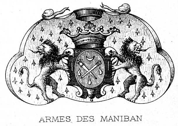 Armes de la famille de Busca-Maniban, par Paul Benouville. Illustration de l’ouvrage de Ph. Lauzun « Les châteaux gascons de la fin du XIIIe siècle », Auch, G. Foix 1898.